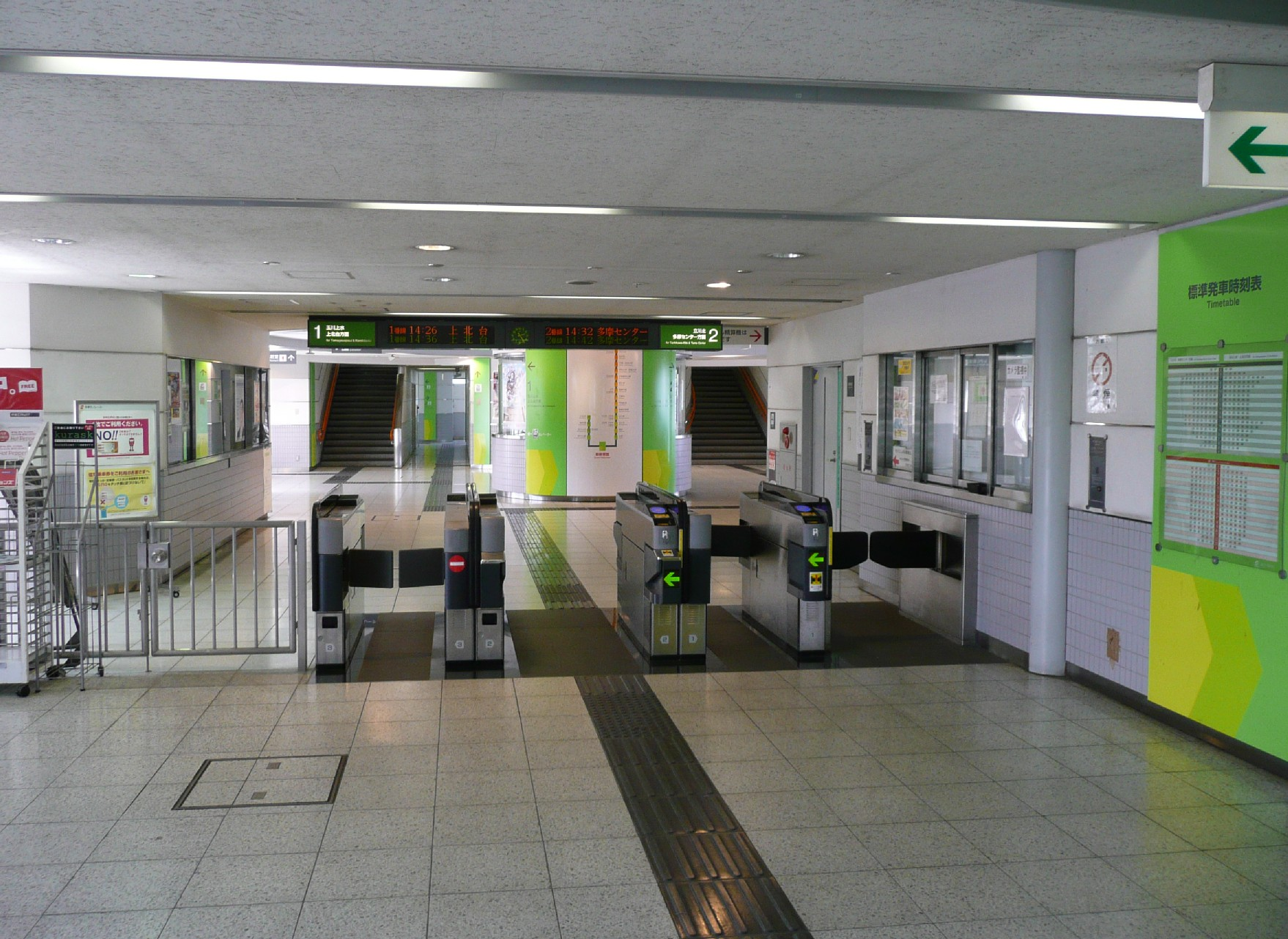 泉体育館駅改札口